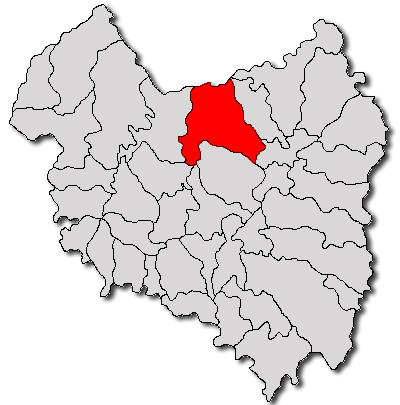 Location of Turia (or Torja), Covasna County, Romania Categorie:Hărţi ale judeţului Covasna